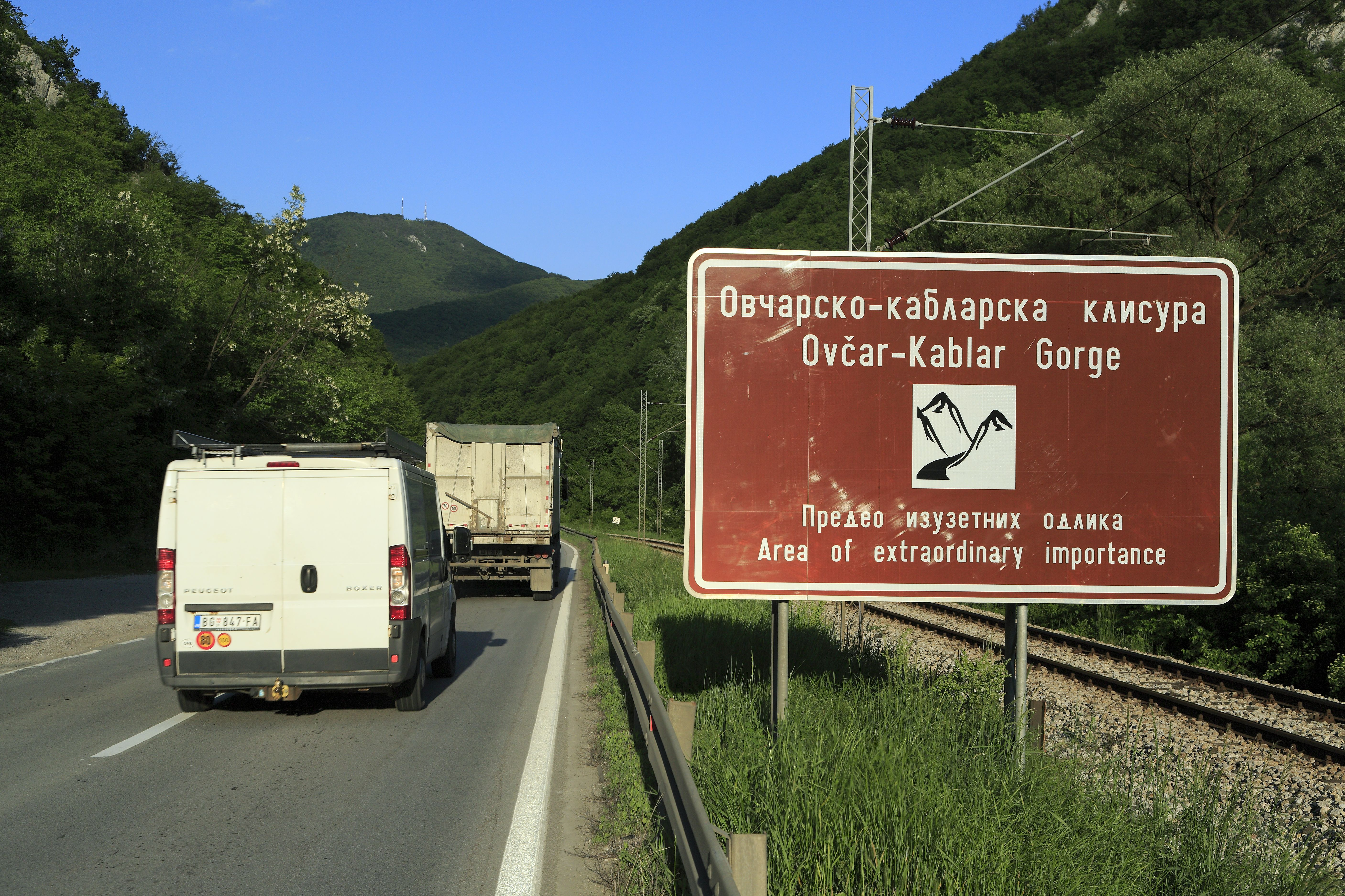 im Durchbruchtal der Westlichen Morava. Eine das Tal umgehende Autobahn ist zwar im Bau, doch ohne Änderung in der Verkehrspolitik wird sich die Kraftverkehrabelastung wohl nicht beruhigen.